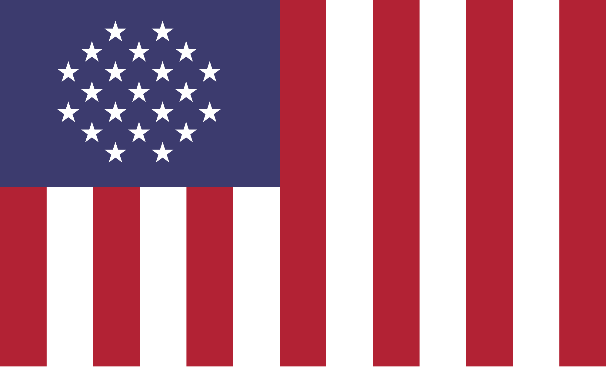 Drapeau du nouveau gouvernement de Cheyenne les États Alliés d'Amérique, dans la série télé Jericho.